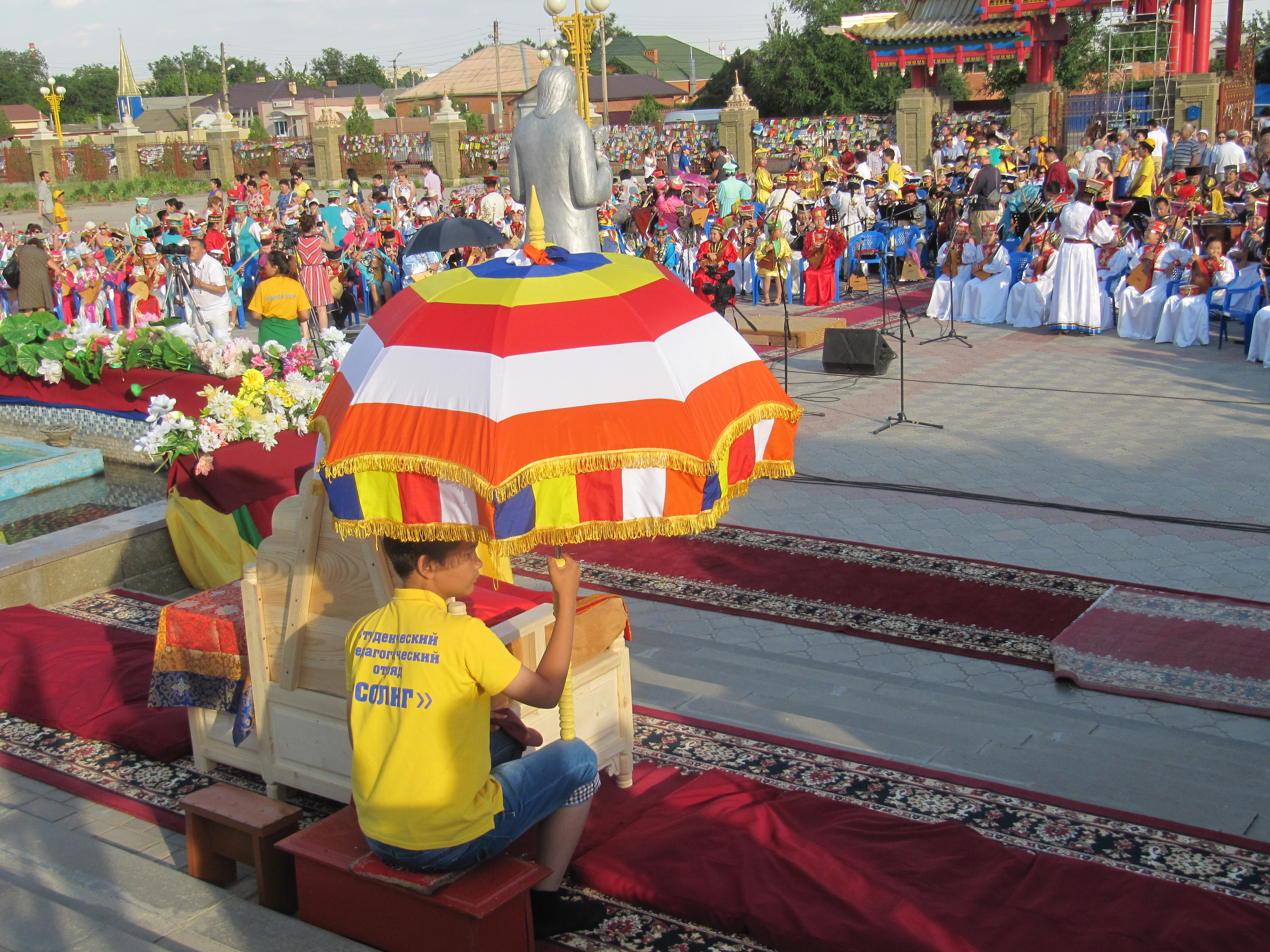 Концерт сводного концерта домбристов в Элисте, около хурула, 14.06.2015